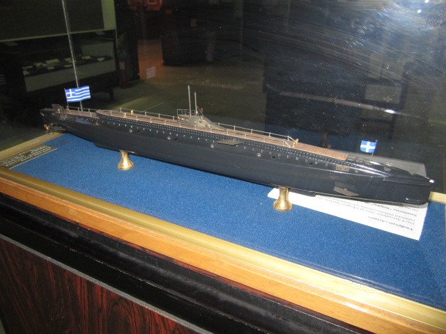 Το "Δελφίν I", Πολεμικό μουσείο.